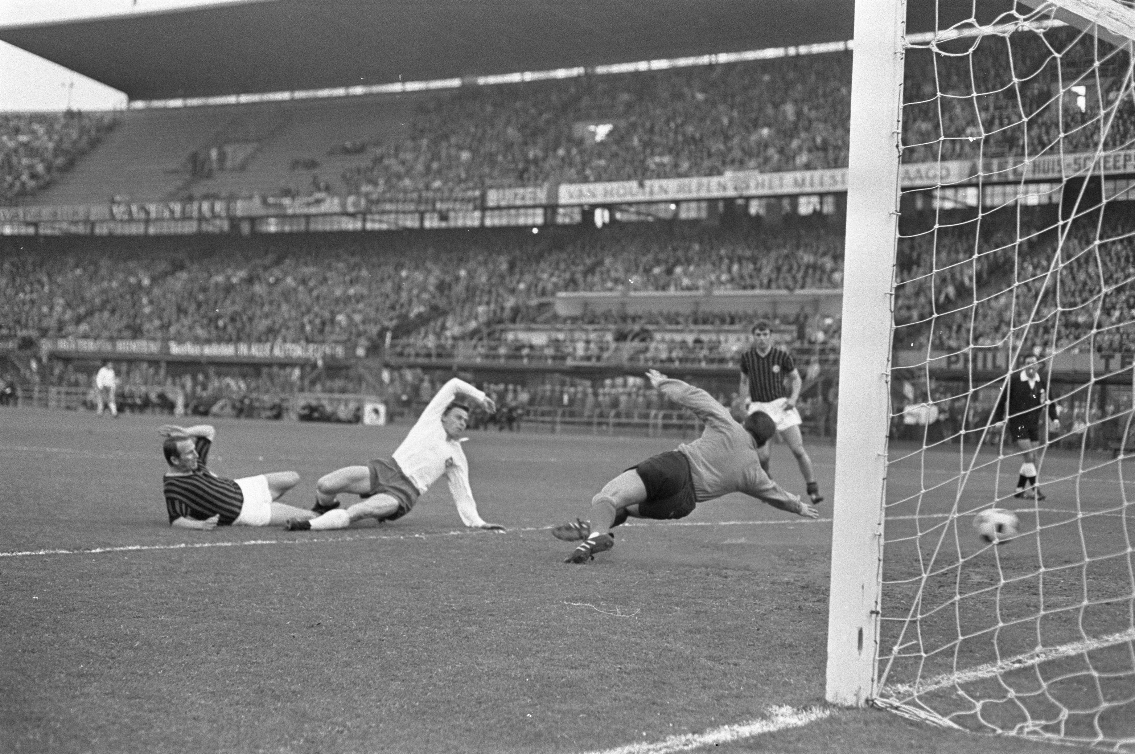 Collectie / Archief : Fotocollectie Anefo Reportage / Serie : [ onbekend ] Beschrijving : Finale Europa Cup II AC Milan tegen HSV Hamburg 2-0. Kurt Hamrin (links) maakt eerste goal, JÃ¼rgen Kurbjuhn en keeper ArkoÃ§ Ã–zcan geslagen Datum : 23 mei 1968 Locatie : Rotterdam Trefwoorden : sport, voetbal Instellingsnaam : AC Milaan Fotograaf : Kroon, Ron / Anefo Auteursrechthebbende : Nationaal Archief Materiaalsoort : Negatief (zwart/wit) Nummer archiefinventaris : bekijk toegang 2.24.01.05 Bestanddeelnummer : 921-3772